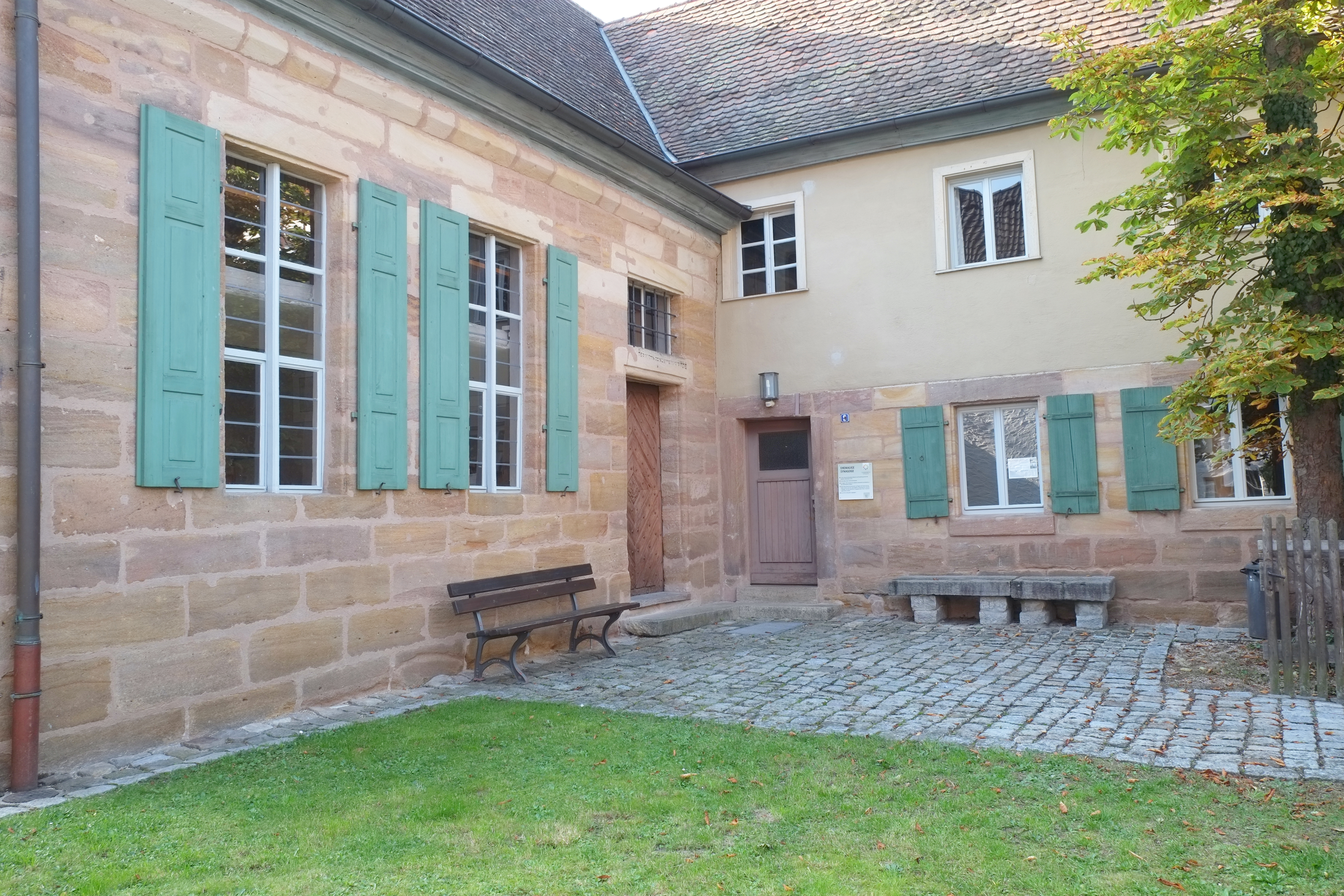 Synagoge in Georgensgmünd im Landkreis Roth (Bayern/Deutschland)